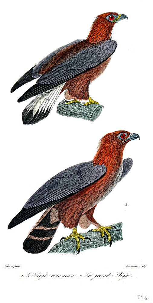 Aigle commun et grand aigle dans les oeuvres complètes de Buffon en 1837